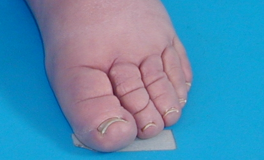 Typisches Stemmer Zeichen - Verdickung prox. der Bereiches 2. und 3. Zehe